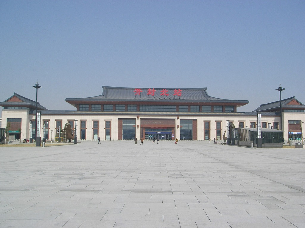 開封北駅駅舎